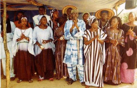 La culture à Agnam-Goly en tenue traditionnelle